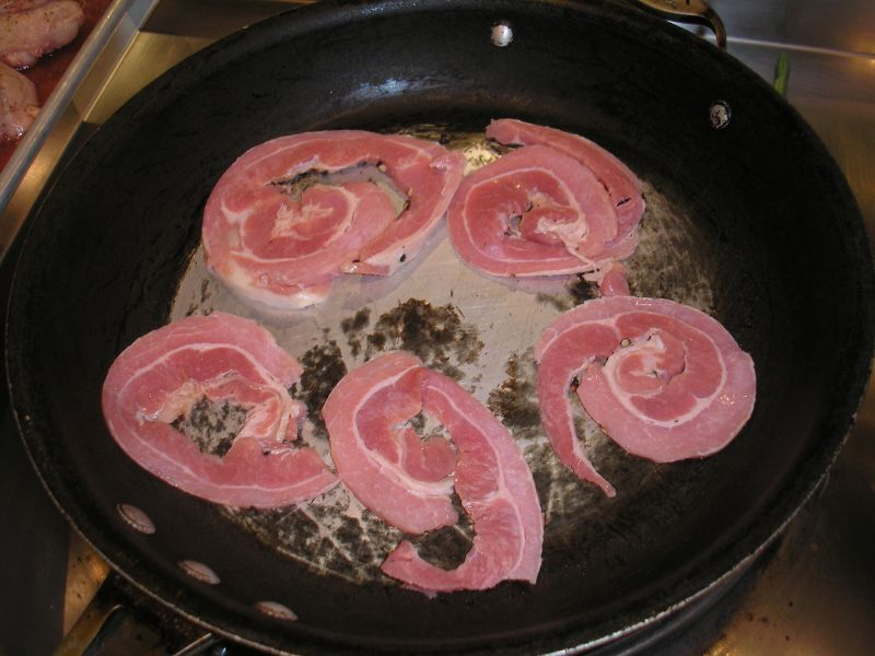 Ventrèche, poitrine salée, revenue à la poêle